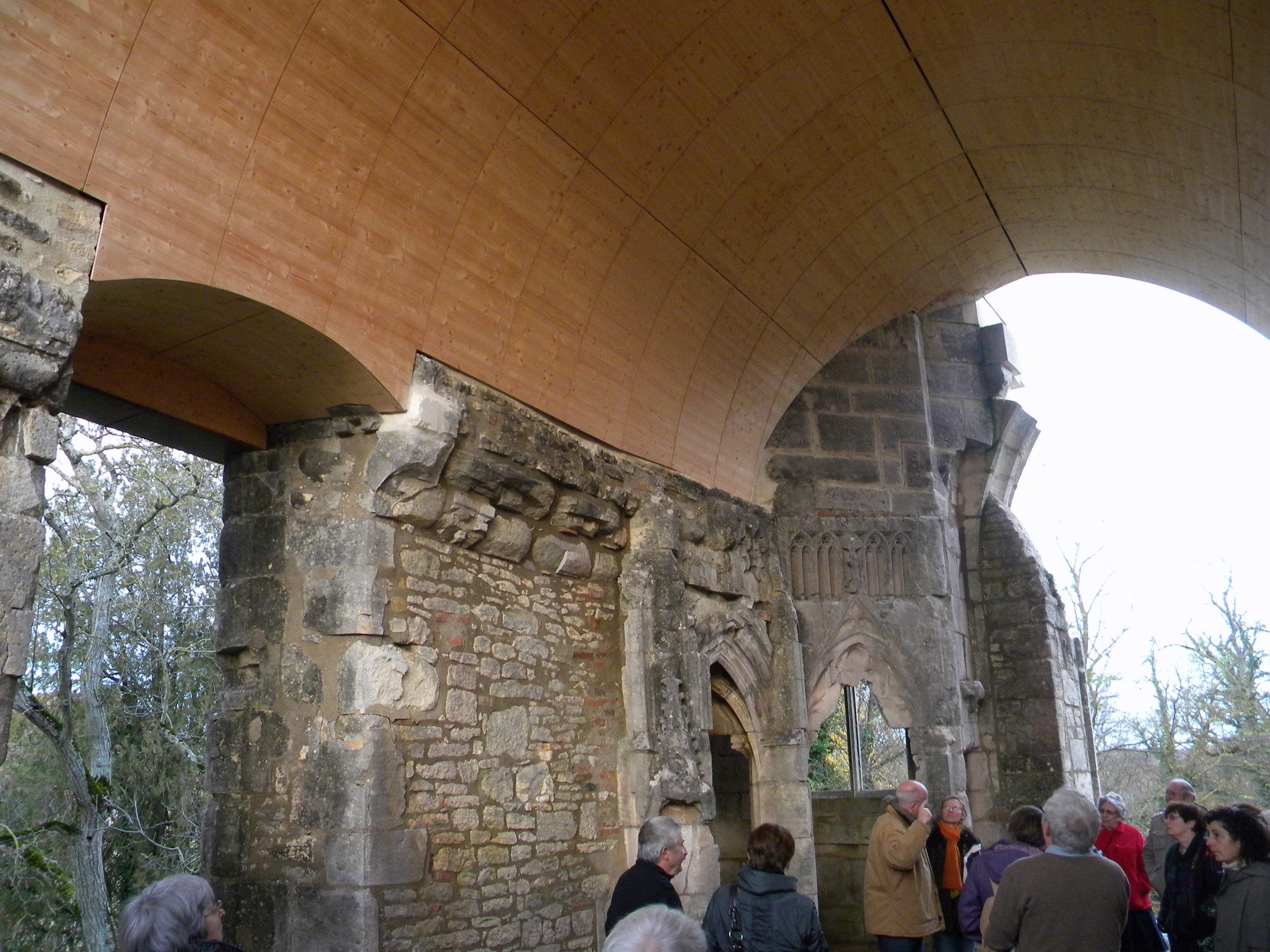 preĝejeto